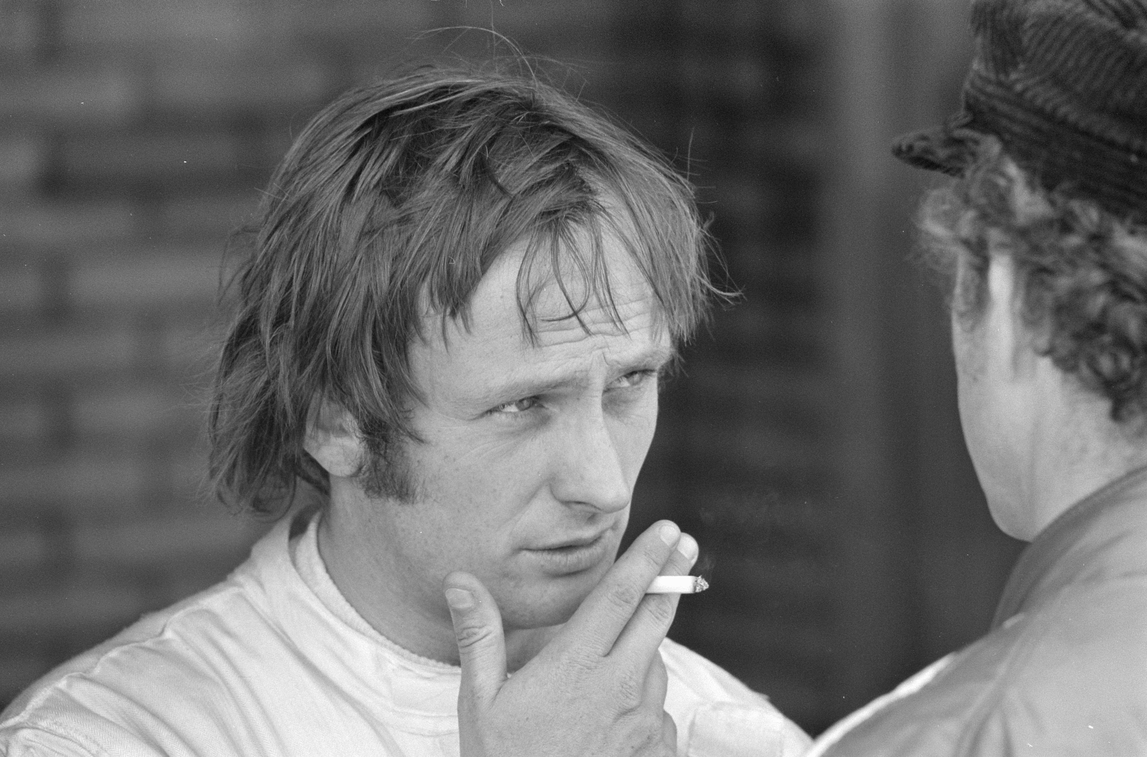 Collectie / Archief : Fotocollectie Anefo Reportage / Serie : Grand Prix , Zandvoort, training Beschrijving : Chris Amon Datum : 16 juni 1971 Locatie : Noord-Holland, Zandvoort Trefwoorden : autosport, circuits, portretten, races, sporttrainingen Persoonsnaam : Amon, Chris Fotograaf : Joost Evers / Anefo, [onbekend] Auteursrechthebbende : Nationaal Archief Materiaalsoort : Negatief (zwart/wit) Nummer archiefinventaris : bekijk toegang 2.24.01.05 Bestanddeelnummer : 924-6566 Reacties Geplaatst door Archiefhist op 27 juni 2014 - 19:24. Op de rug is - onmiskenbaar - Lotus-baas Colin Chapman te zien.